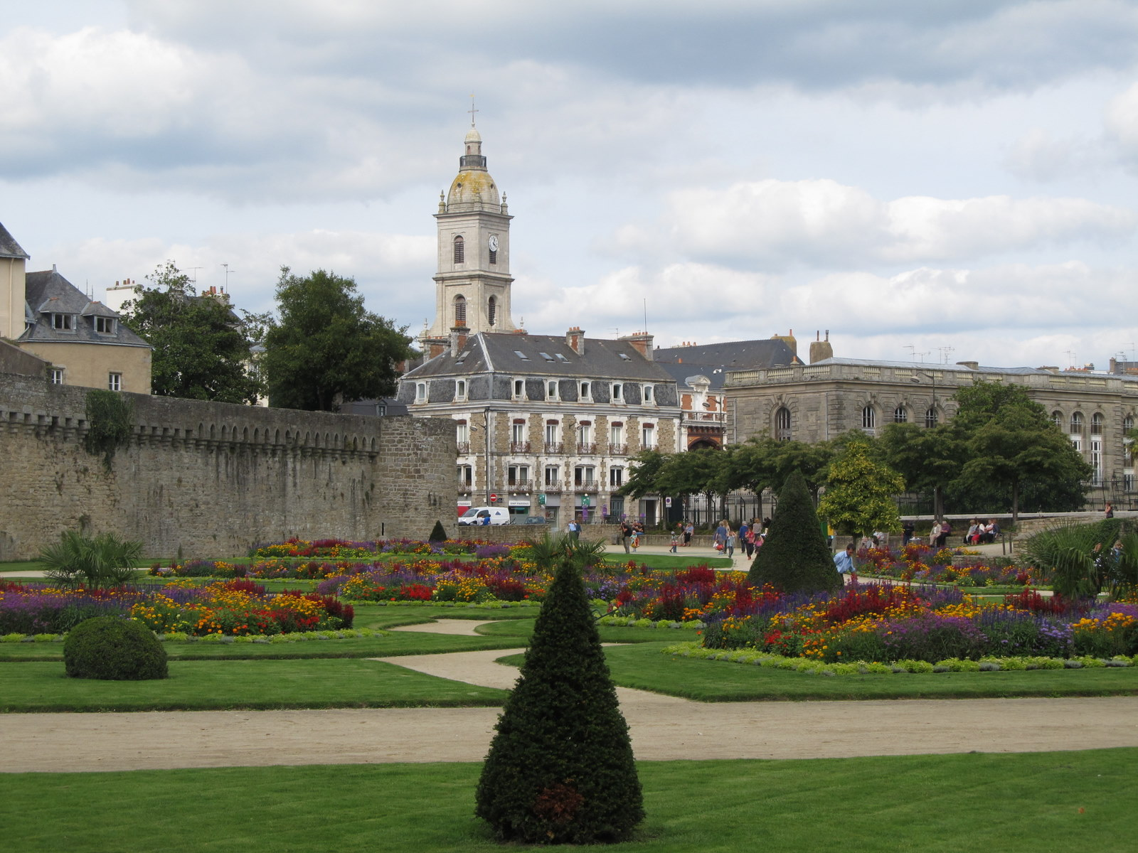 Vannes